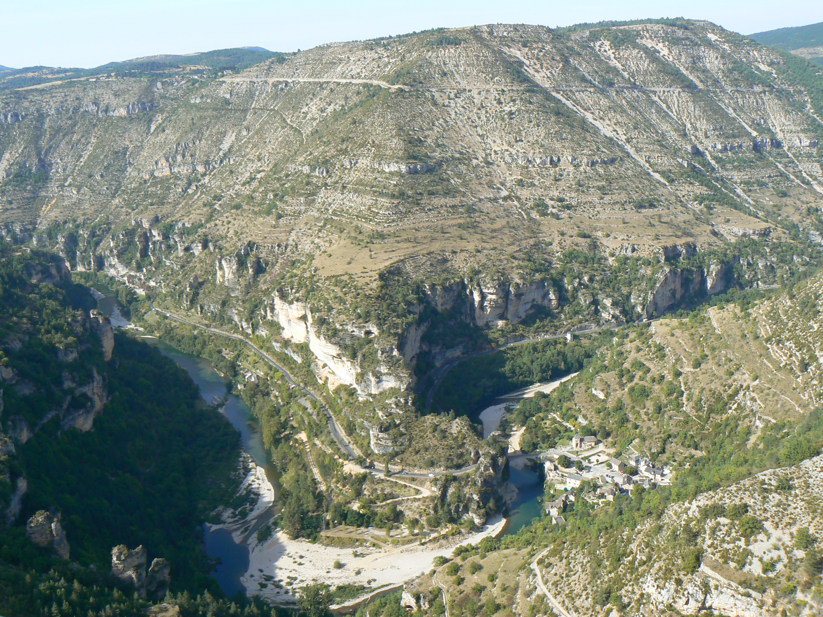 Vue sur Saint-Chély-du-Tarn (commune de Sainte-Enimie) et les cirques de Pougnadoires et de Saint-Chély en Lozère (FRance)